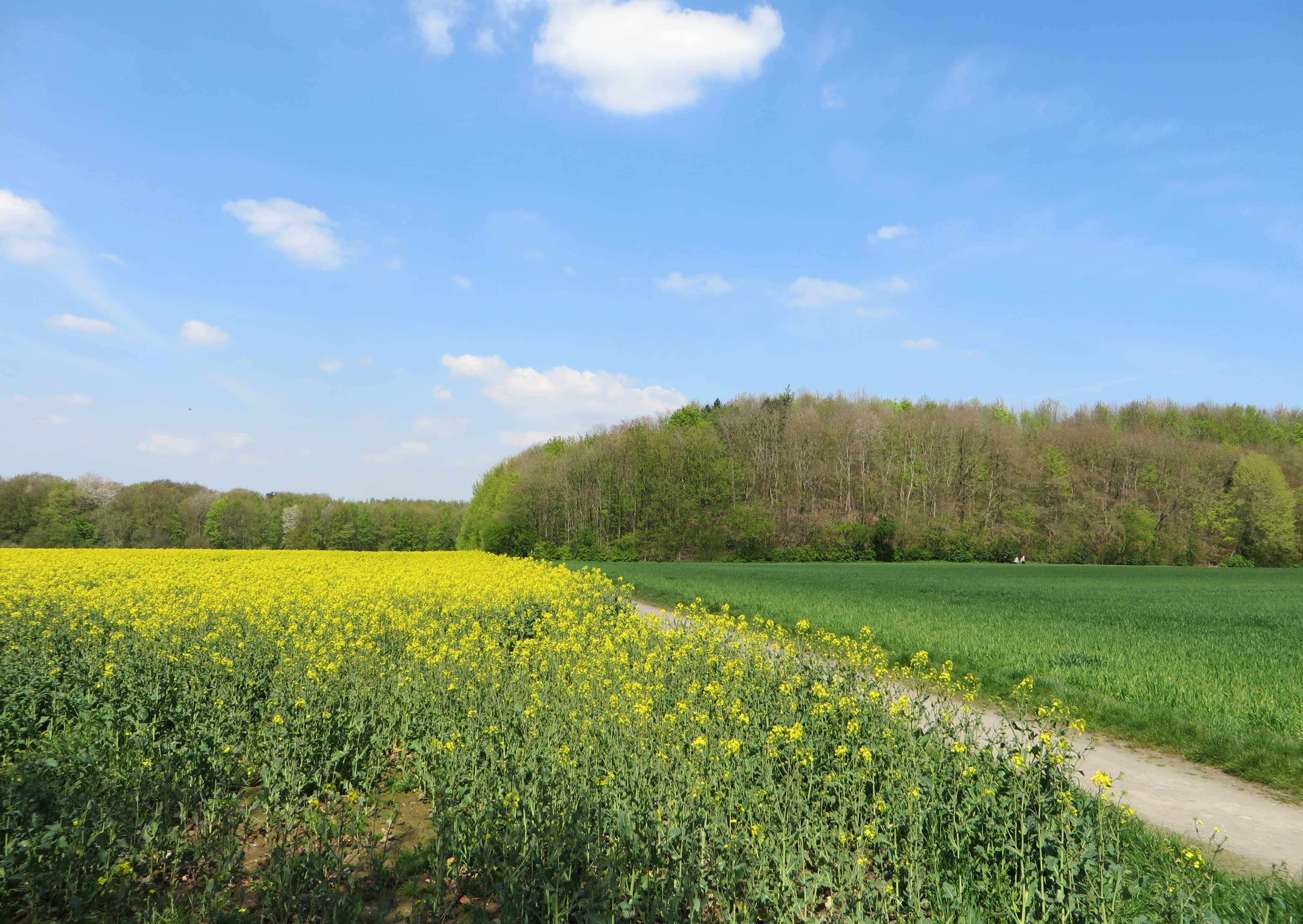 Landschaftsschutzgebiet „Hassley“ in Hagen-Haßley. Es handelt sich um landwirtschaftlich genutzte Flächen mit kleineren Waldbeständen und wertvollen Althölzern. In dem Schutzgebiet befindet sich auch der Dolomitsteinbruch „Donnerkuhle“. Blick vom Wanderweg „Am Teich“ (Foto).